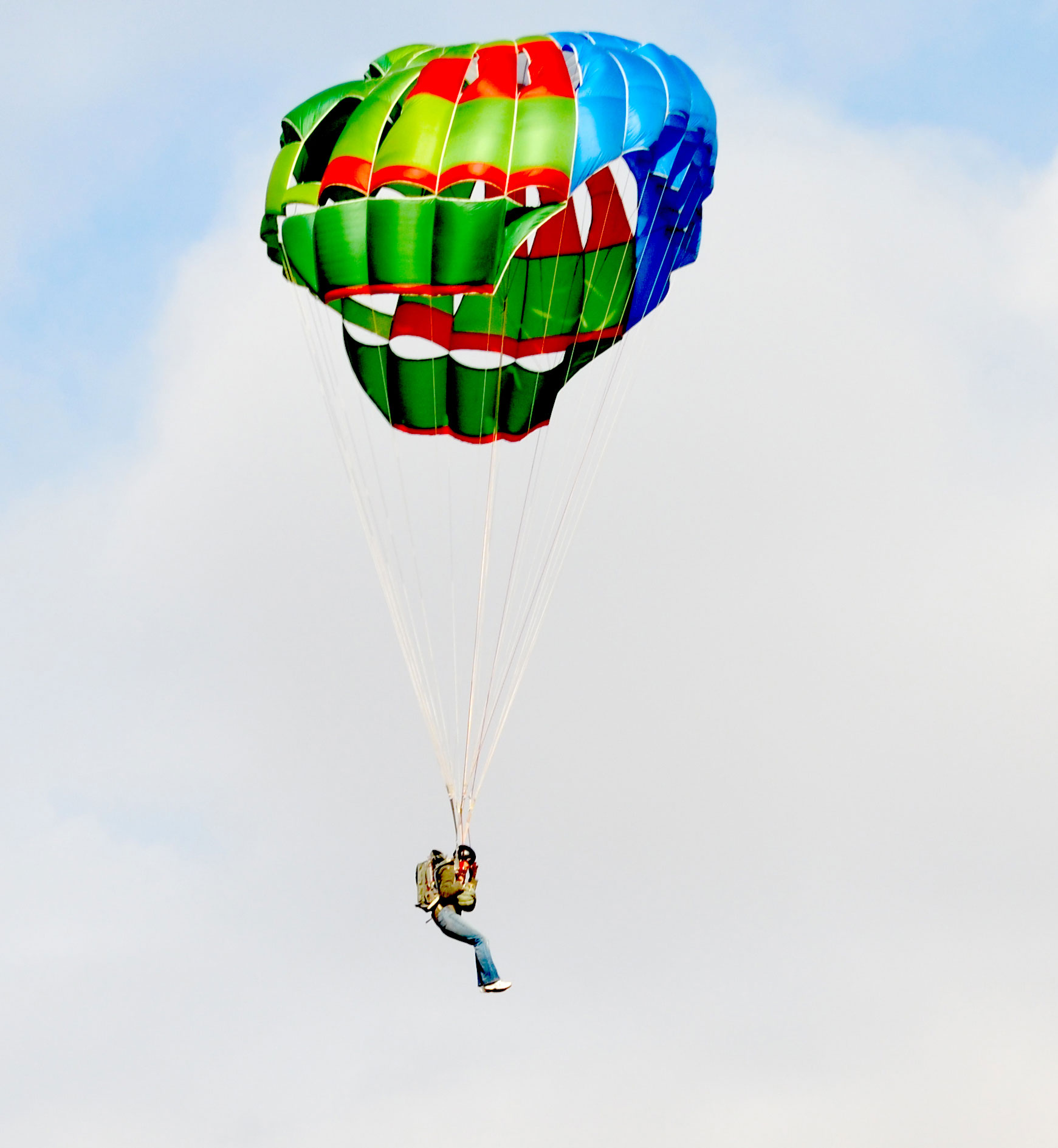 Պարաշյուտ ՈՒՏ-15